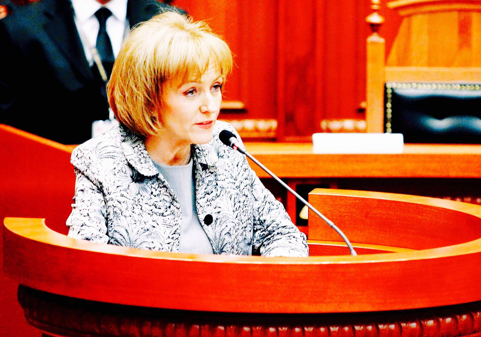 Maj 2012, Shqiperia merr per here te pare, Presidencen e rradhes (6 mujore), ne Keshillin e Europes - Council of Europe. Pernaska flet ne Kuvendin e Shqiperise me kete rast, si Anetare e Delegacionit te Perhershem Parlamentar, ne Keshillin e Europes (PACE), 2005 - 2013.